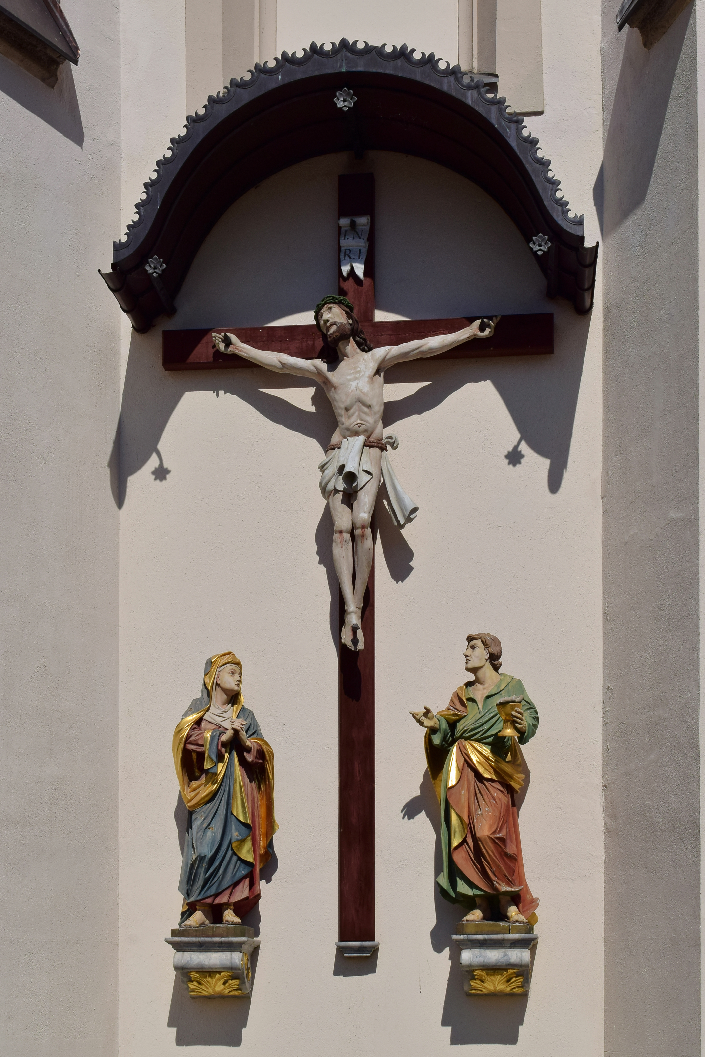 Kath. Pfarrkirche St. Martin in Innervillgraten - Kreuzigungsgruppe von Karl Fürhapter (1852) This media shows the remarkable cultural object in the Austrian state of Tyrol listed by the Tyrolean Art Cadastre with the ID 82235. (on tirisMaps, pdf, more images on Commons, Wikidata)